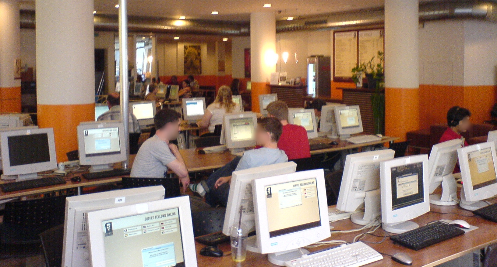 München – Schützenstr. – Coffee Fellows – 1. OG – Internet-Café